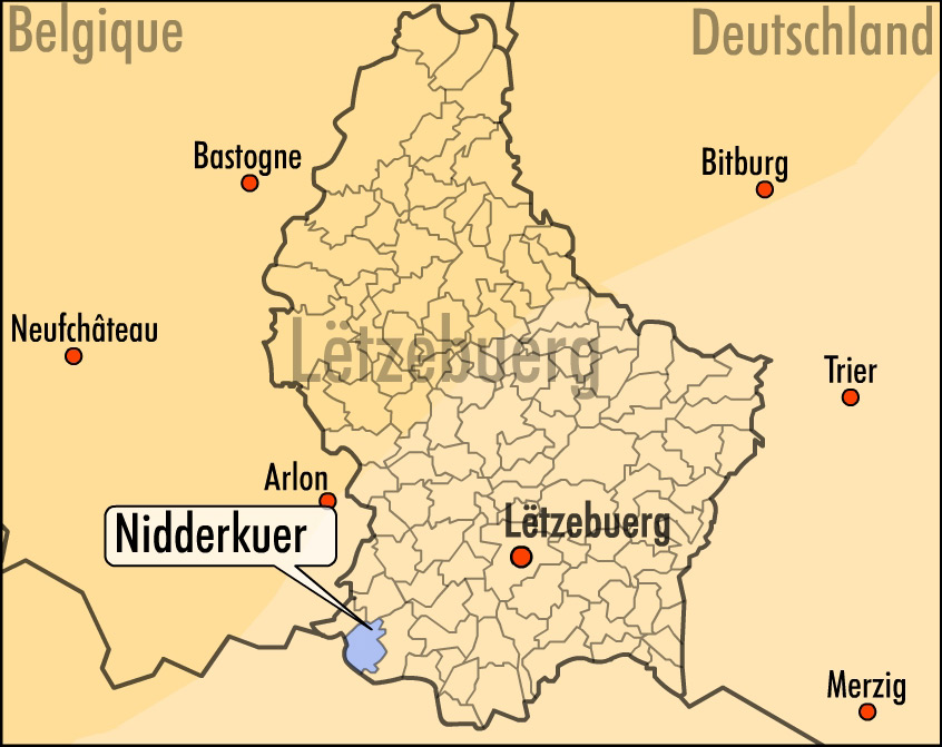 Geografesch Laag vu Nidderkuer1